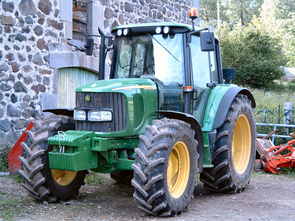 Tracteur Agricole John Deere 6320, France